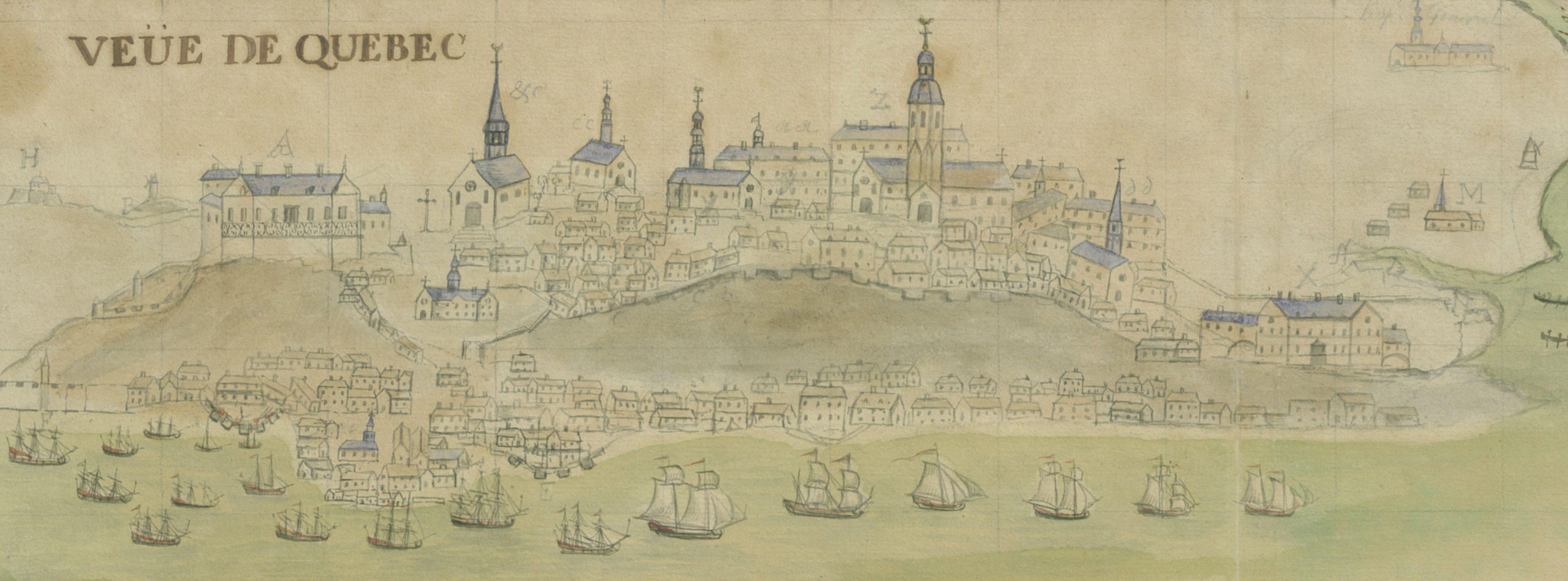 Détail d'une carte parue en 1729 et portant le titre exact de : Carte figurative du promt secours envoyé par l'ordres [sic] de Monseigneur le Mr de Beauharnois,... gouverneur et lieutenant général pour Sa Majesté dans tout l'estendue de la Nouvelle France, au vaisseau du Roy l'Eléphant, le 2 Septembre 1729. Dessigné par Mahier, à Québec le 15 octobre 1729.